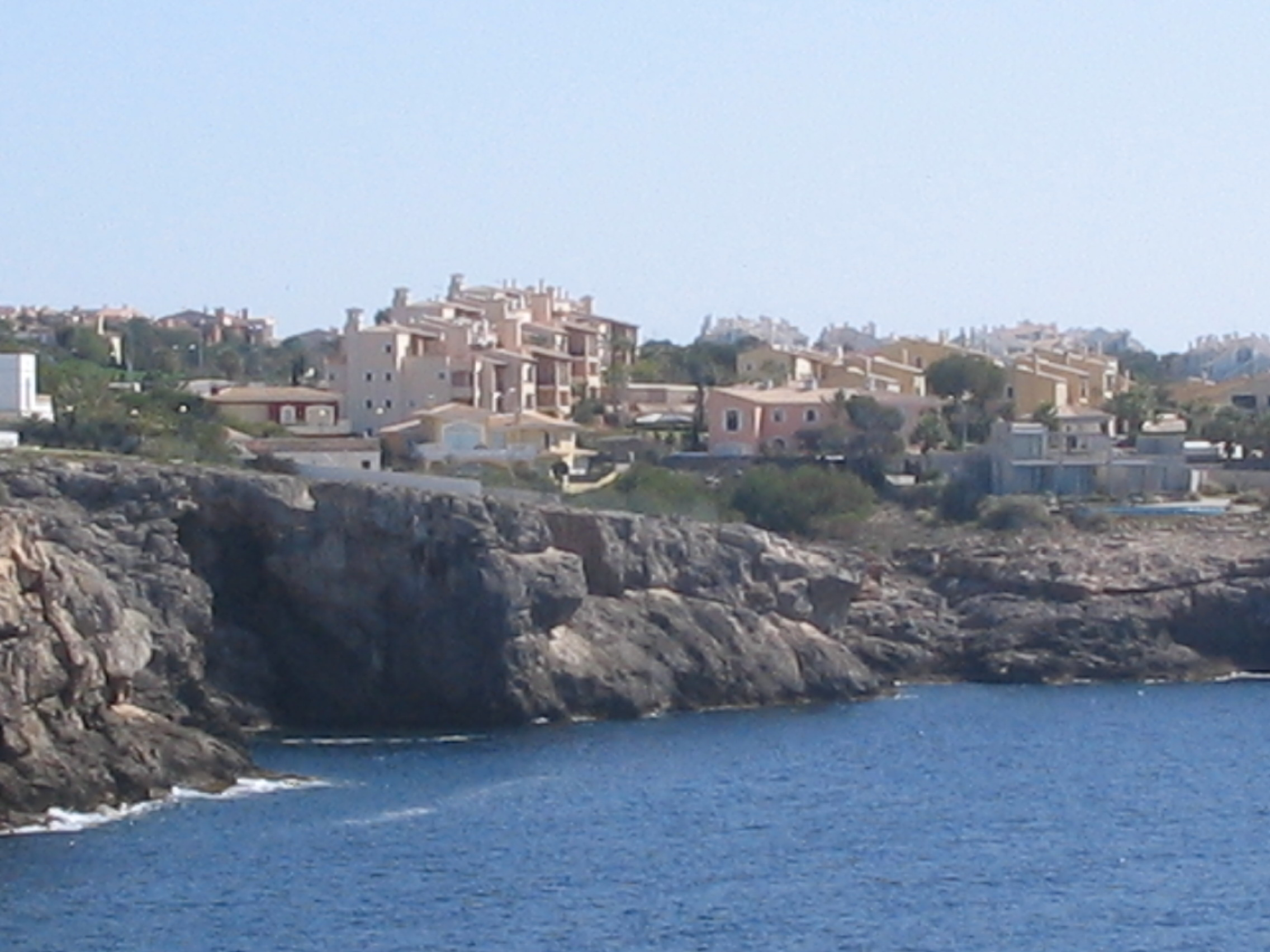 A residential called Nova Santa Ponsa in Mallorca, Spain.